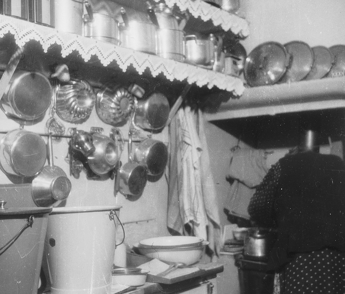 Yttersta Tvärgränd nr 7, köket, bottenvåning.